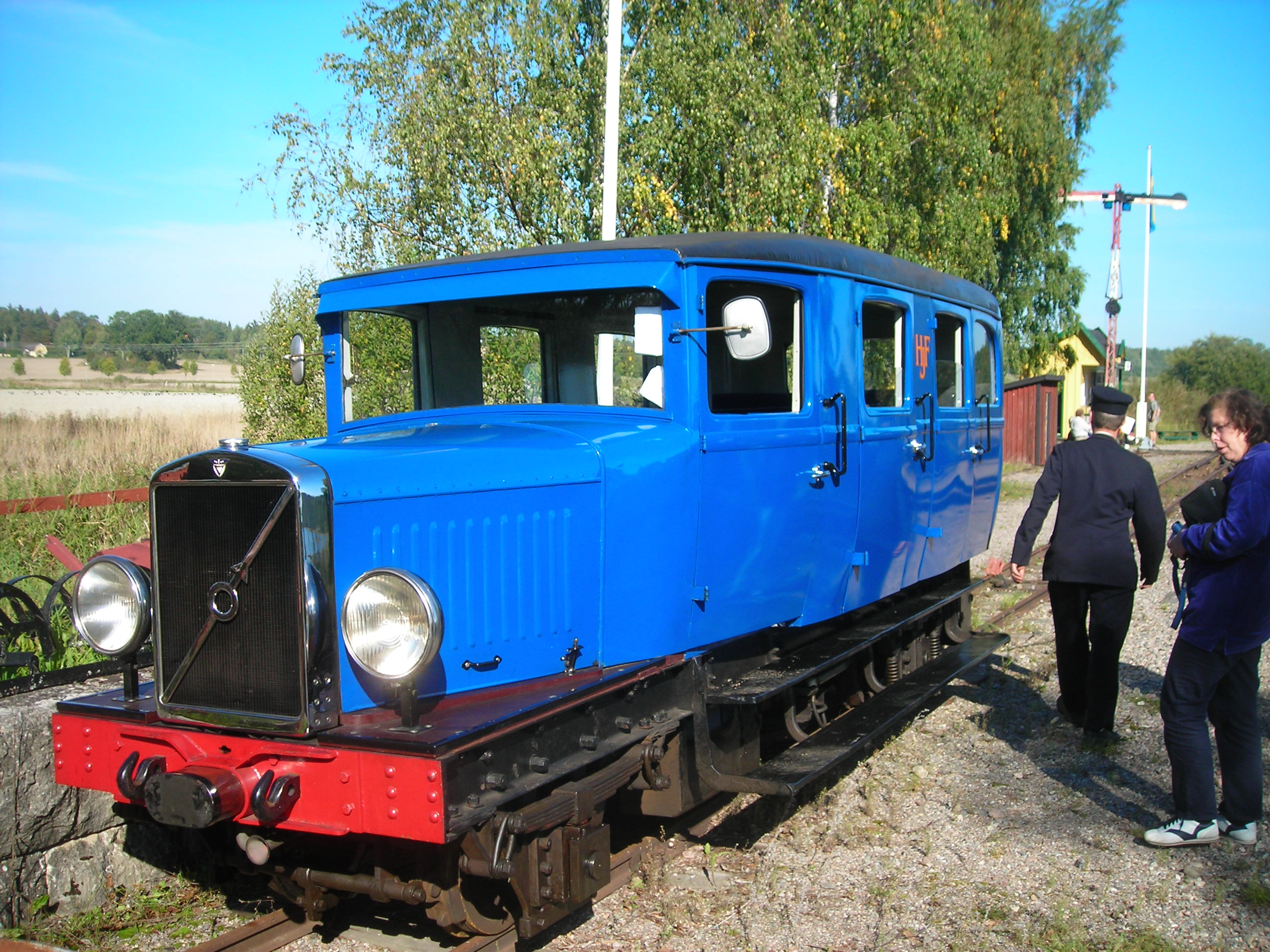 Museibanans dag: HFJ-bussen har ankommit till Marielund för fyr-tågsmöte, kl. 12:20